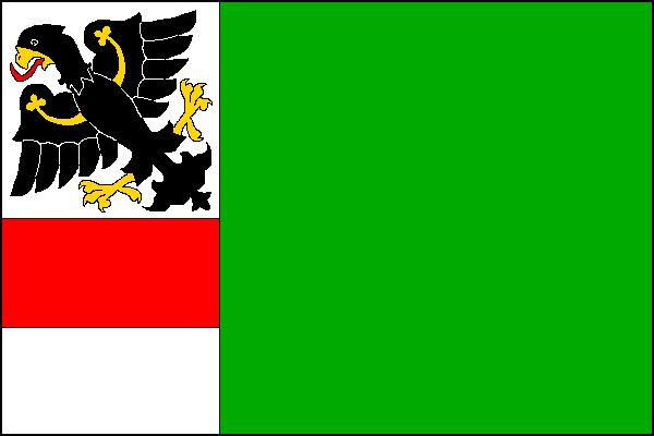 Vlajka obce Vysoká Pec v okrese Chomutov